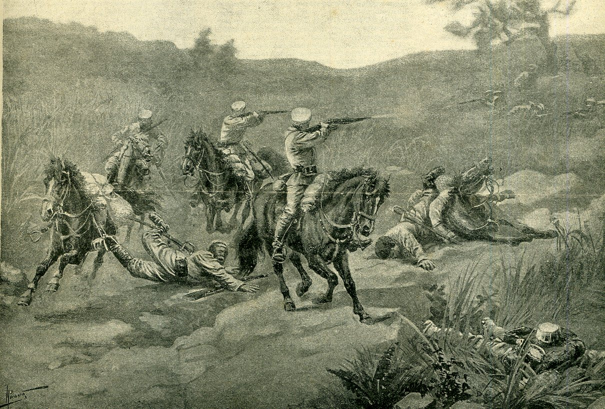 В Маньчжурии. Русский патруль попал в засаду.